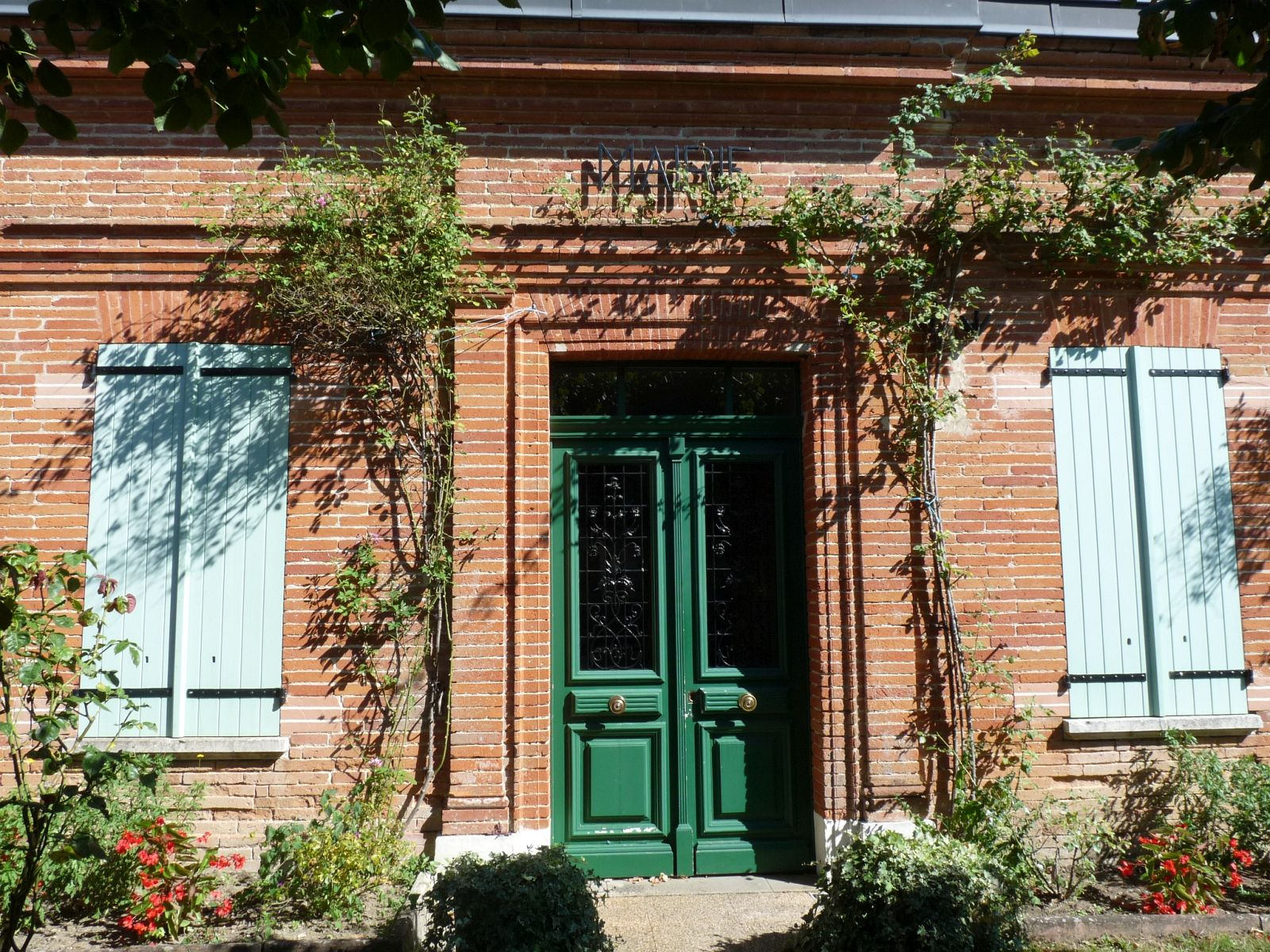 Mairie de Cambiac, Haute-Garonne, France